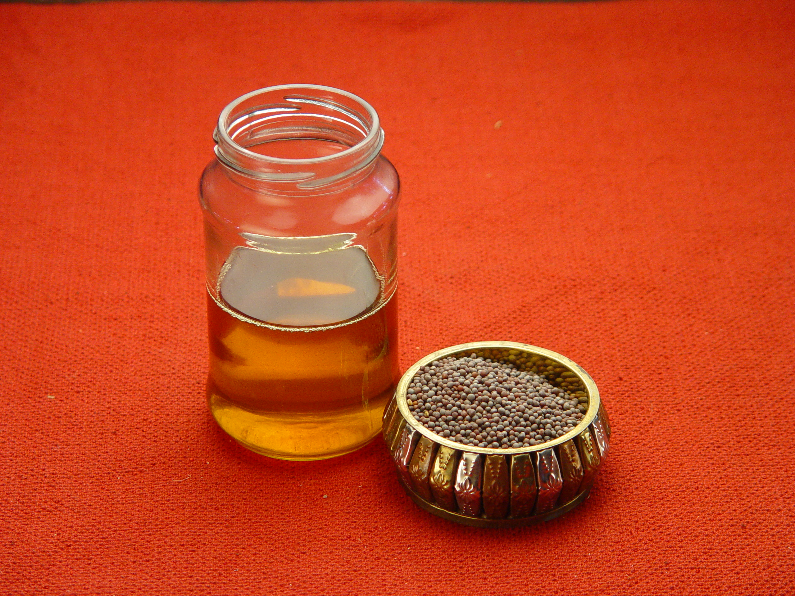 Mustard oil & seeds(English), Sorser tel o Sarse (Bengali), Rai (Gujarati, Hindi, Punjabi), Sasuve (Kannada), Aasur (Kashmiri), Kadugu (Malayalam, Tamil), Mohori (Marathi), Sorisa (Oriya), Avalu (Telugu)